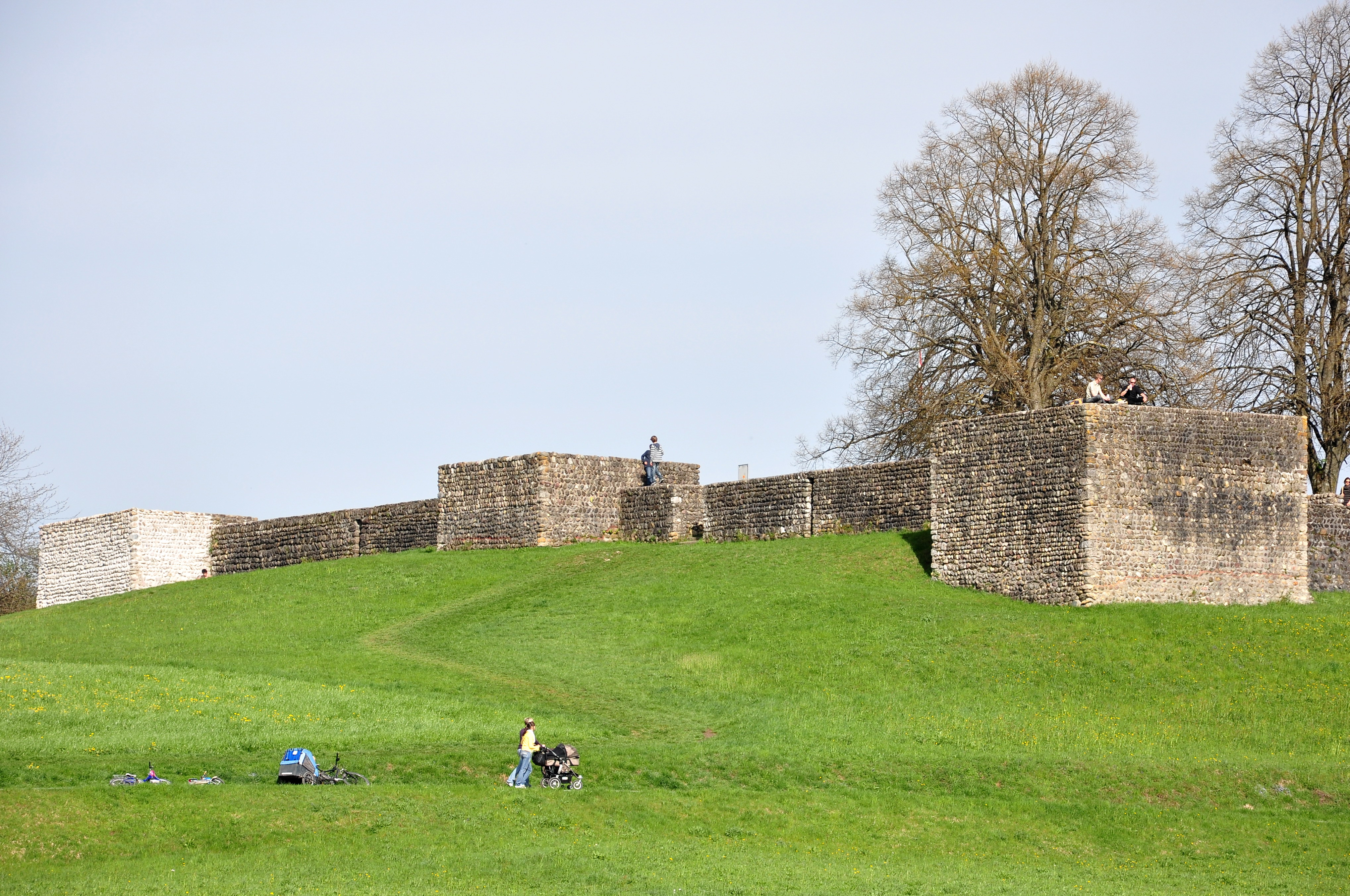 Castrum in Irgenhausen (Switzerland) as seen from towards Pfäffikersee (Lake Pfäffikon)